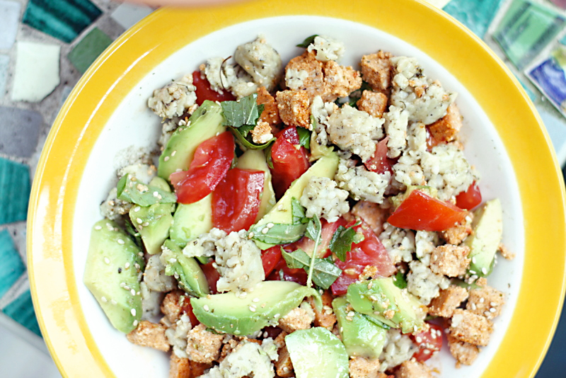 Vegan salad